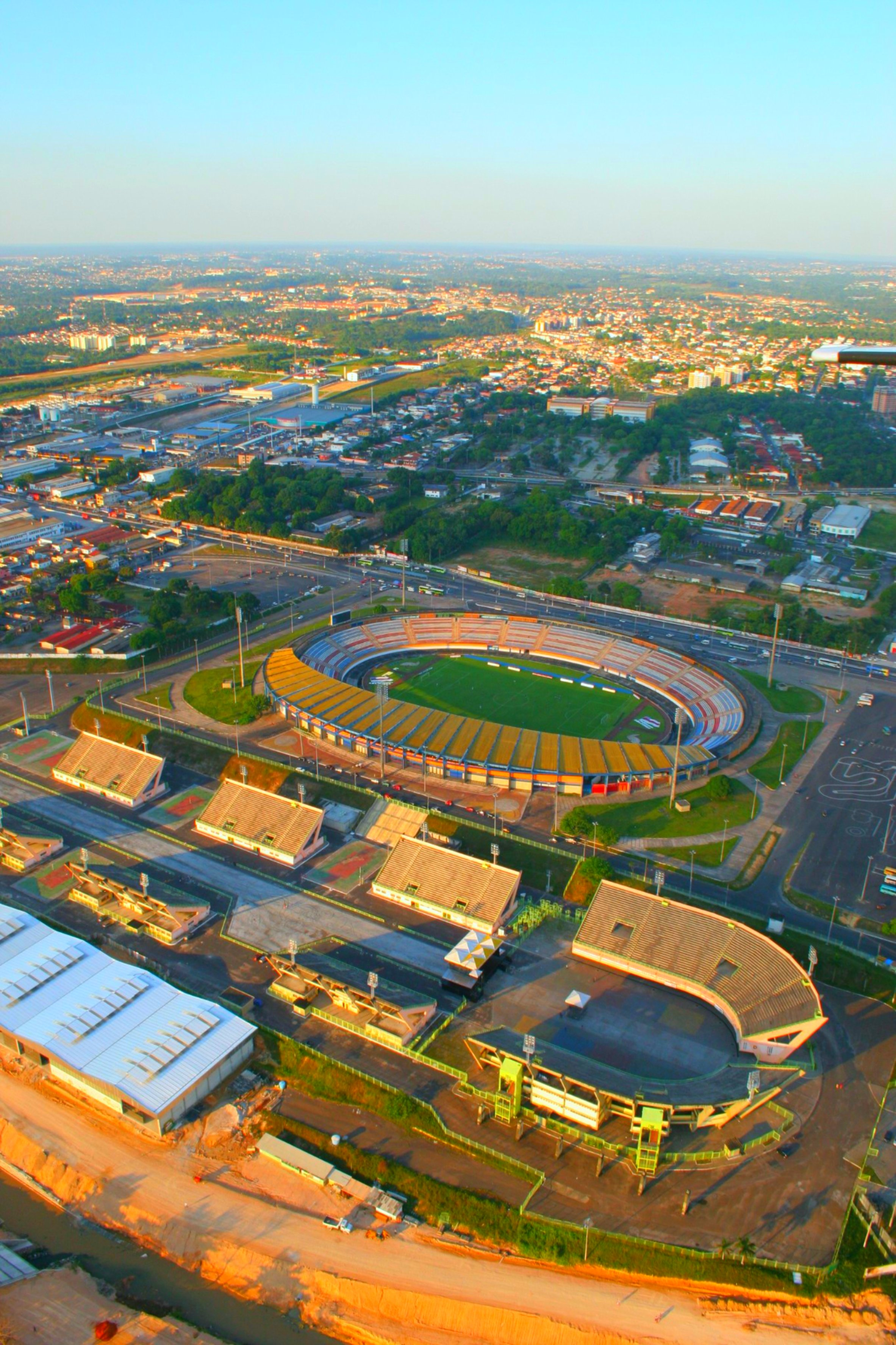 FUTEBOL